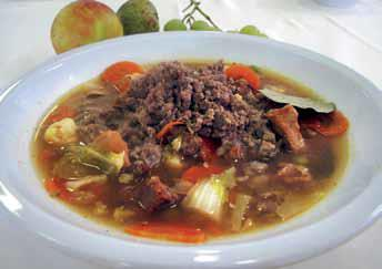 Telečja obara z žganci